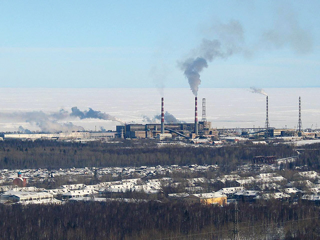 Pulp and paper mill Baikalsk at Baikal Lake, Russian Federation